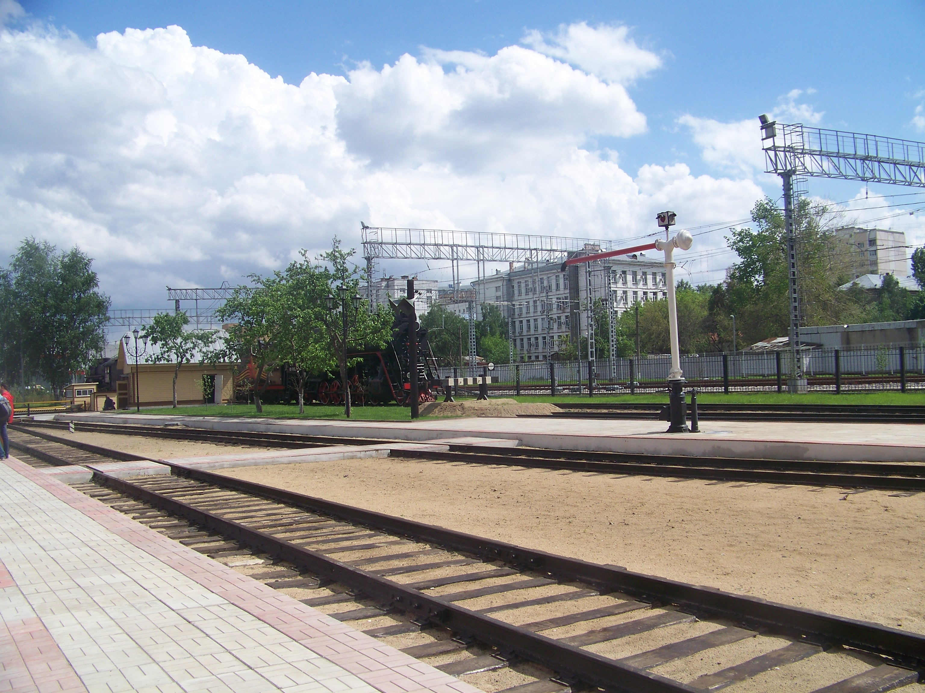 Водоразборная колонка на станции Подмосковная Рижского направления МЖД.